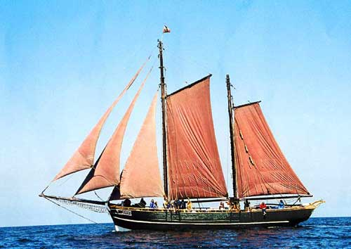 Bild der Ninive, Nachbau einer Pommerschen Galeass